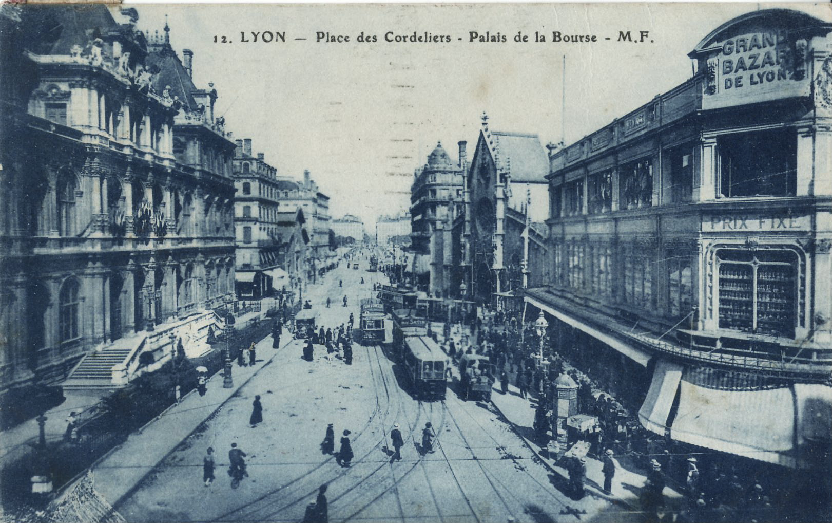 Carte postale ancienne éditée par M. F., n°12 :LYON - Place des Cordeliers - Palais de la Bourse